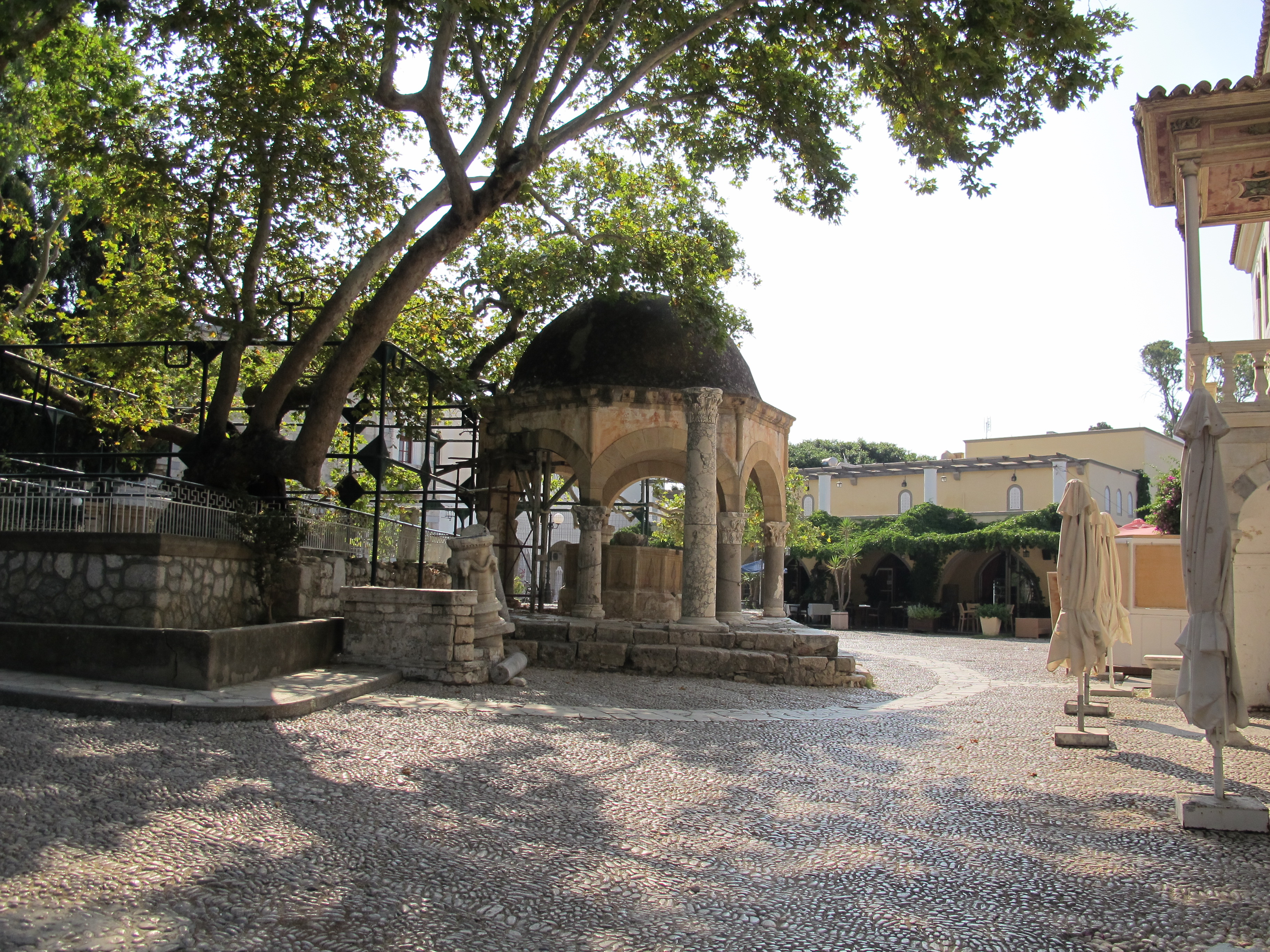 Kos città, palazzo con minareto, fontana per abluzioni